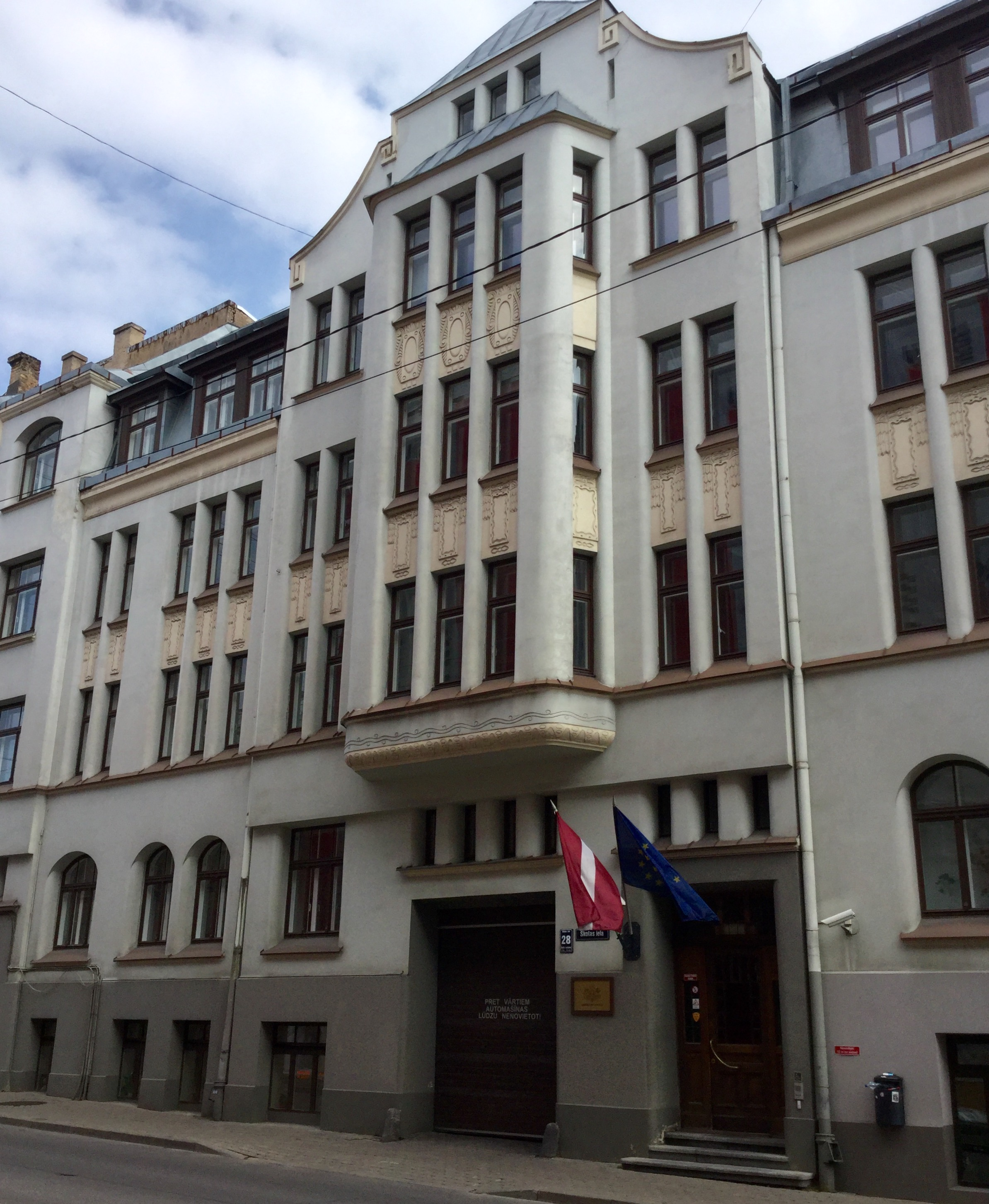 Īres nams, Rīga, Skolas iela 28